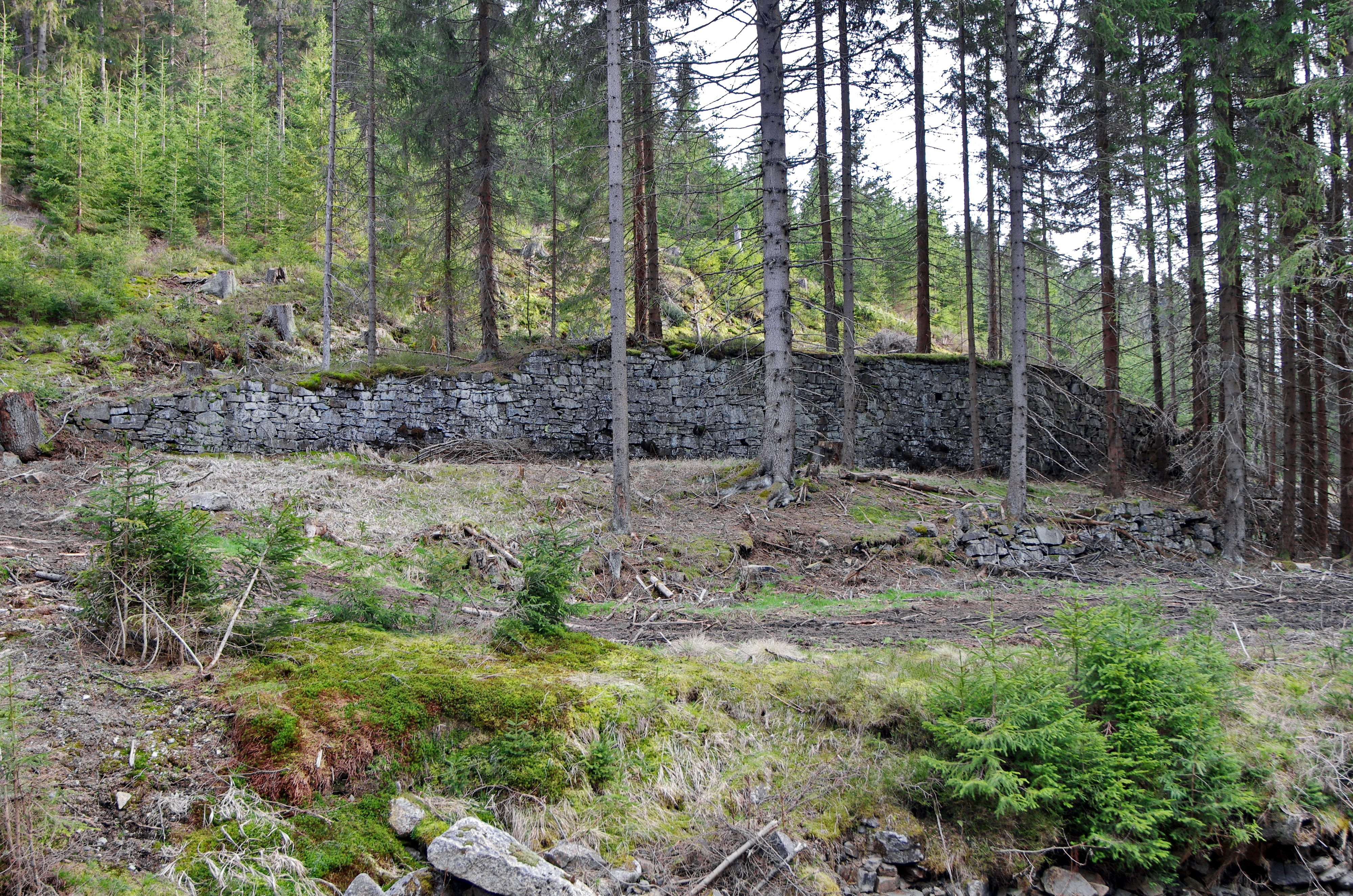 Kobaltový mlýn v zaniklé osadě Luhy, Krušné hory, okres Karlovy Vary